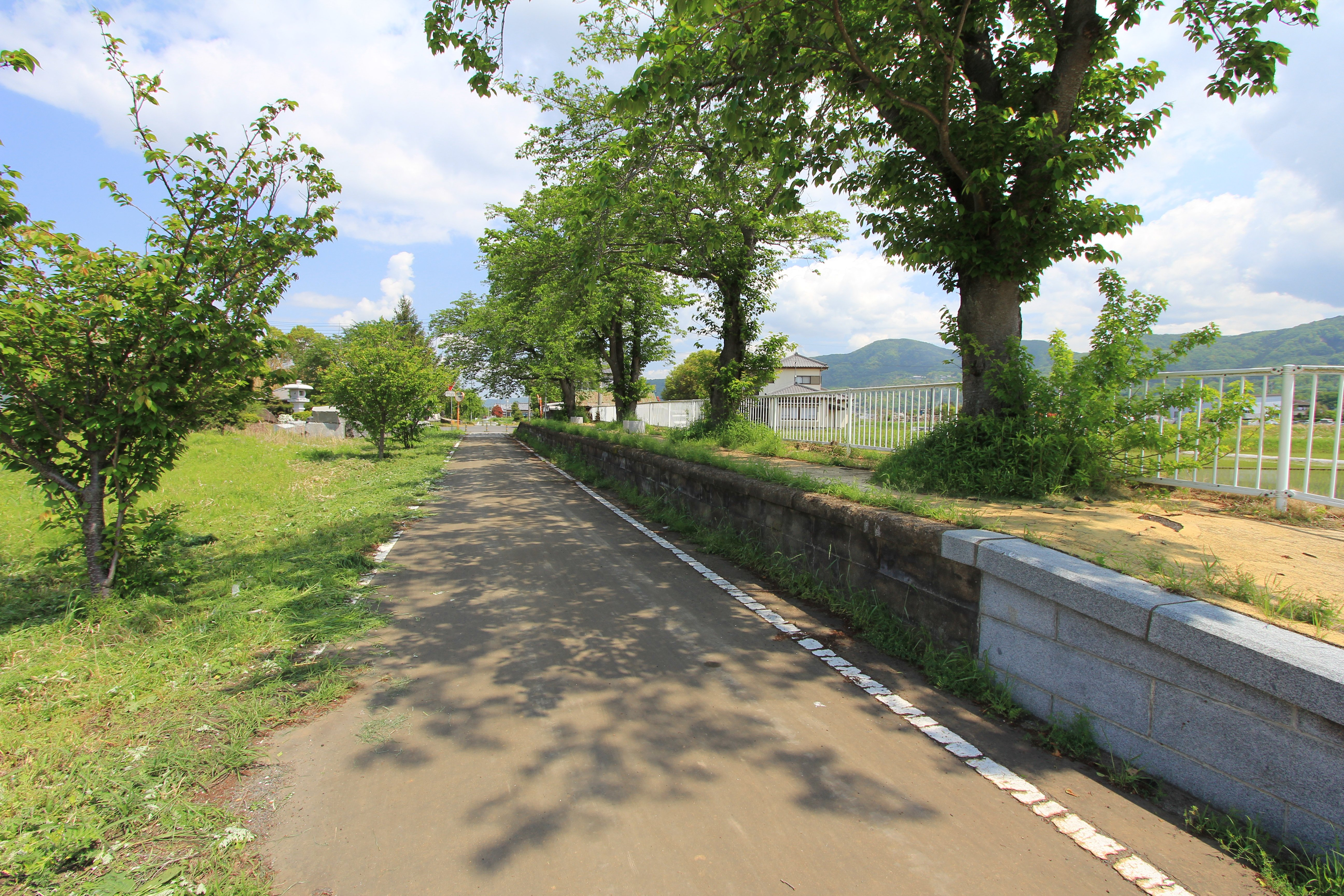 元・東飯田駅